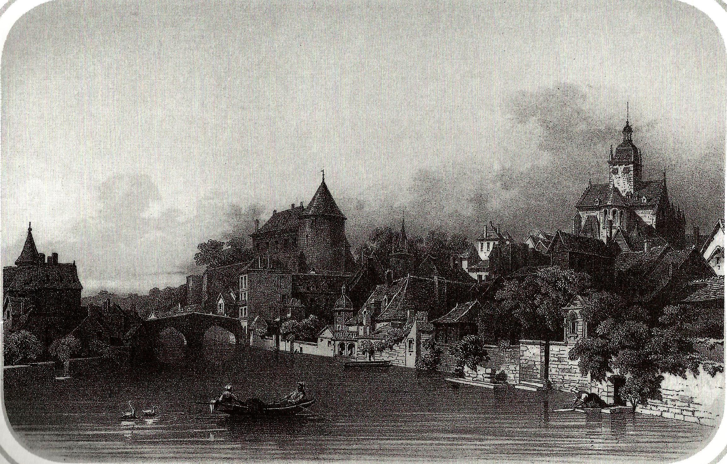 Vue de Mayenne, gravure de Thomas Drake.